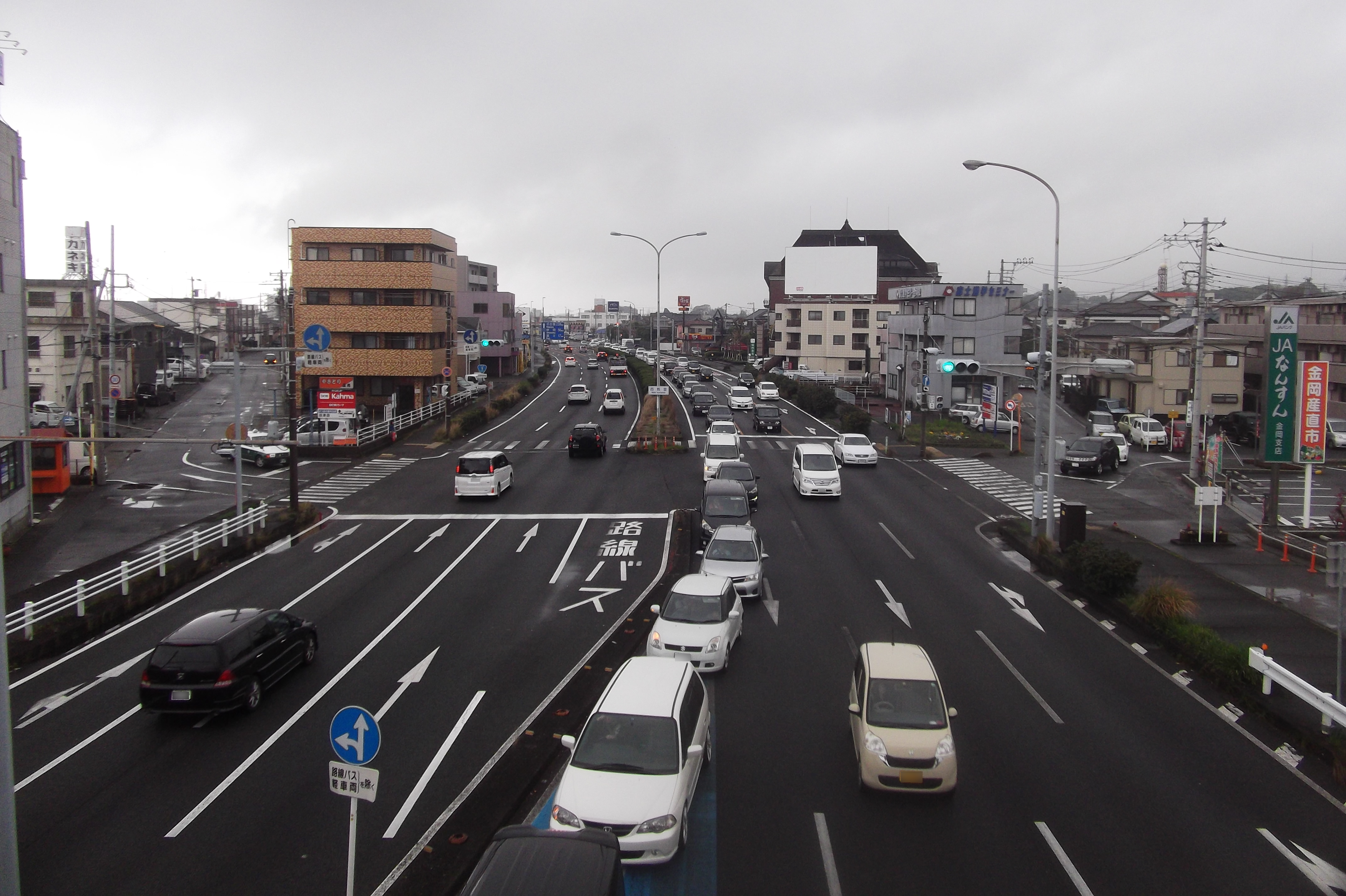 国道一号線、沼津バイパス。西熊堂付近。